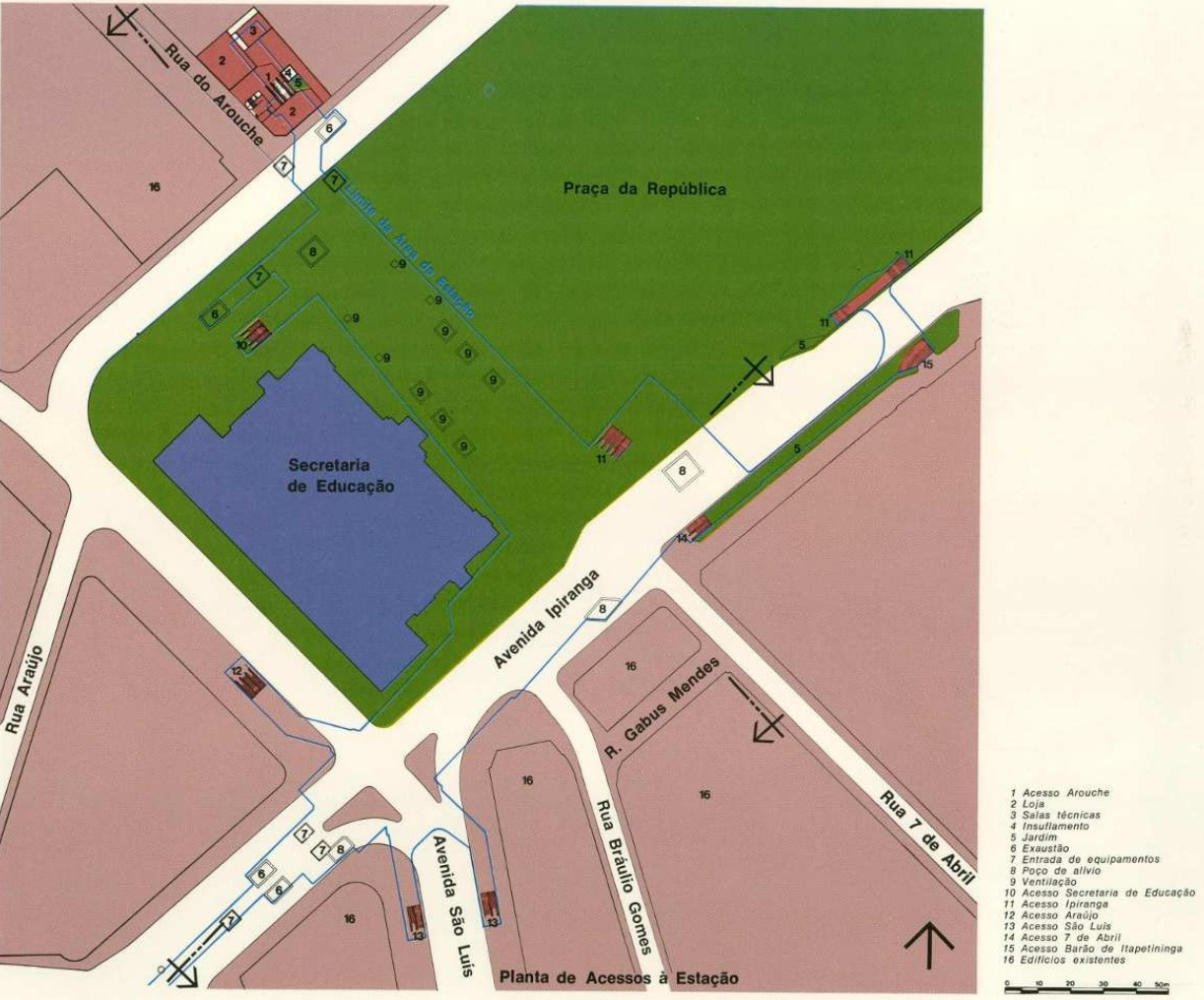 Vista do projeto da estação República. Para evitar a demolição do Colégio Caetano de Campos e da Praça da República, a estação foi construída dessa forma.